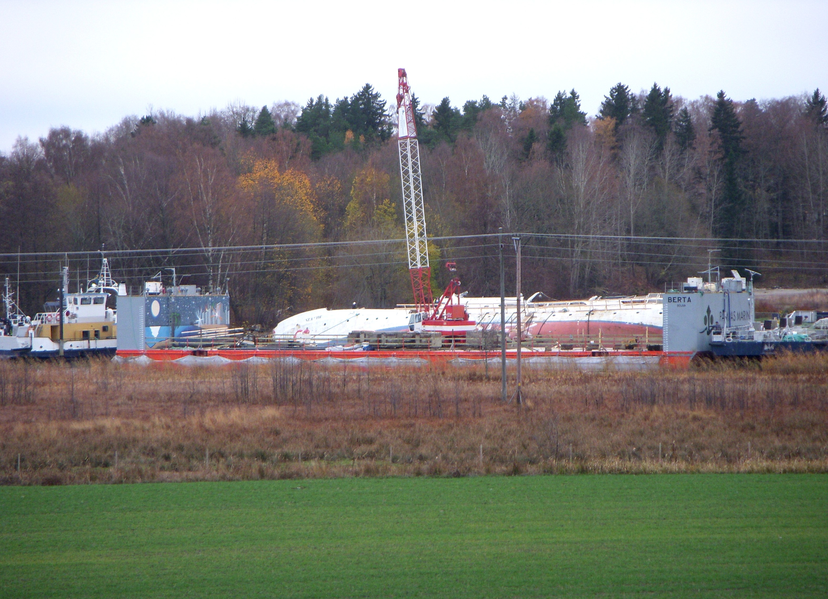 Fartyget Seaside (f.d. Skogøy) vid bärgningsarbetena i Tappström, Ekerö